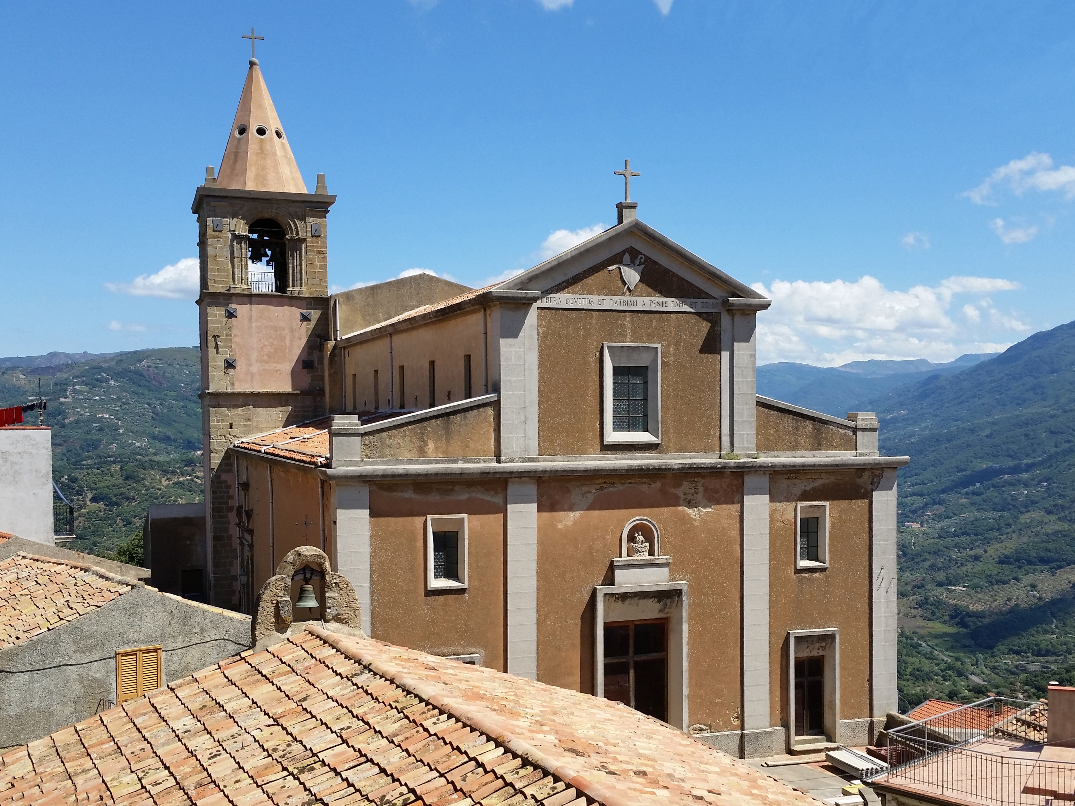 Costruito nel XV secolo, fu eretto in corrispondenza della Grotta di San Michele dove Conone Navacita trascorse gli ultimi anni della sua vita.